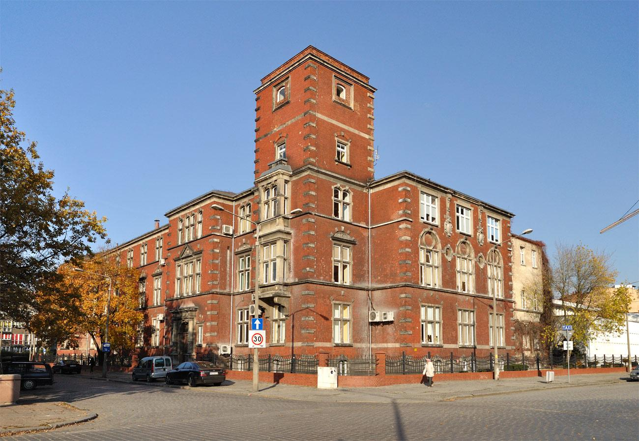 Budynek szpitala przy placu Hirszfelda.